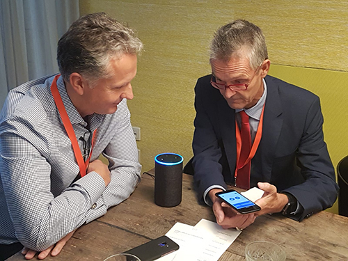 Frank Strzyzewski und Torsten Schwarz bei der ersten Spracheinwilligungs-Erhebung in Wien